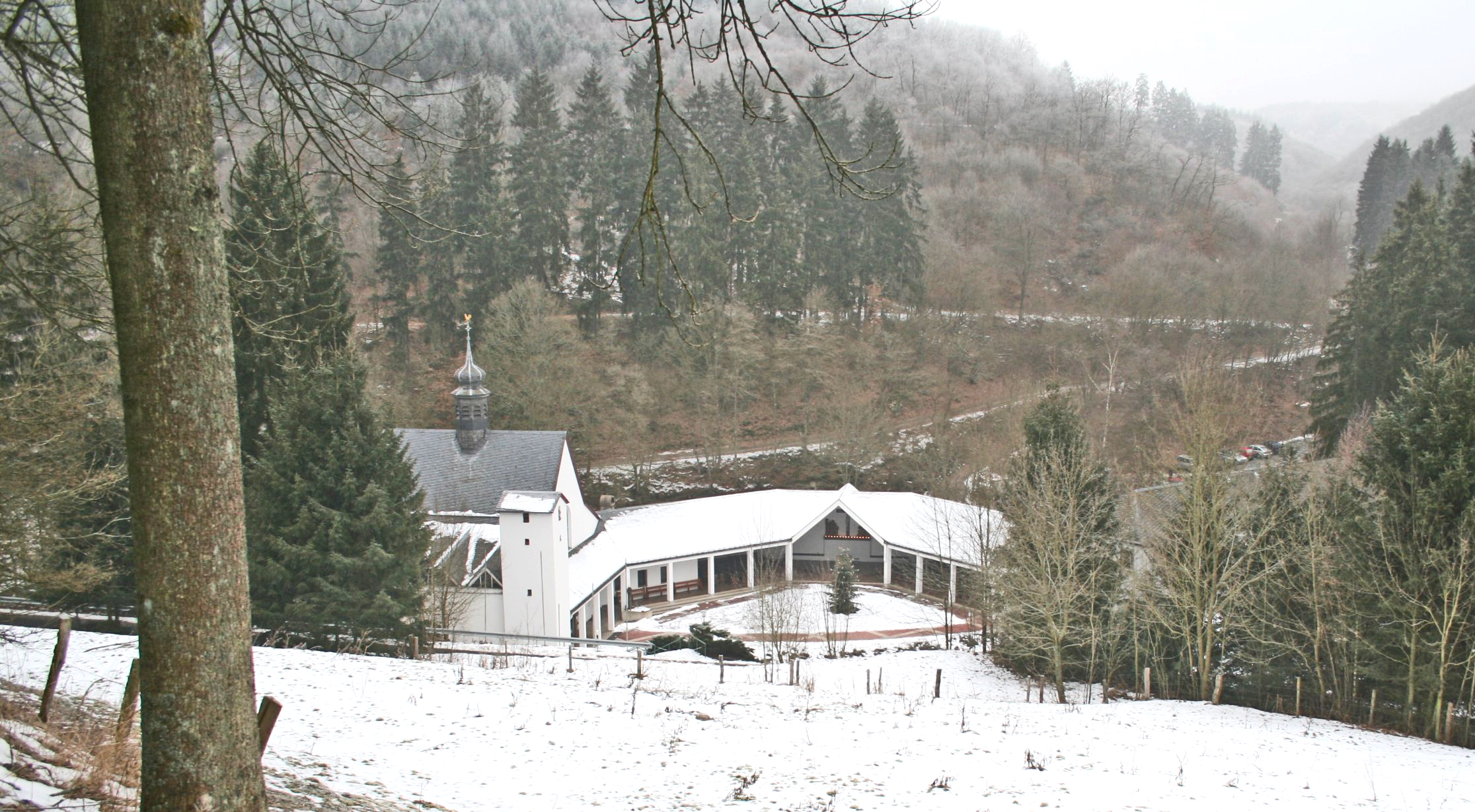 Wallfaartskierch vu Maria Martental.